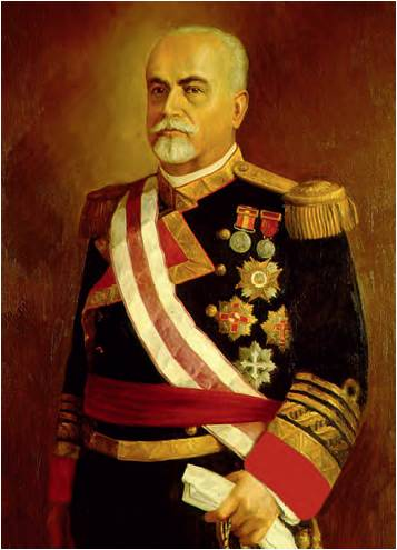 Retrato del marino español Augusto Miranda y Godoy (1855-1920), que llegó a ser vicealmirante de la Armada Española y ministro de marina en cinco ocasiones diferentes.